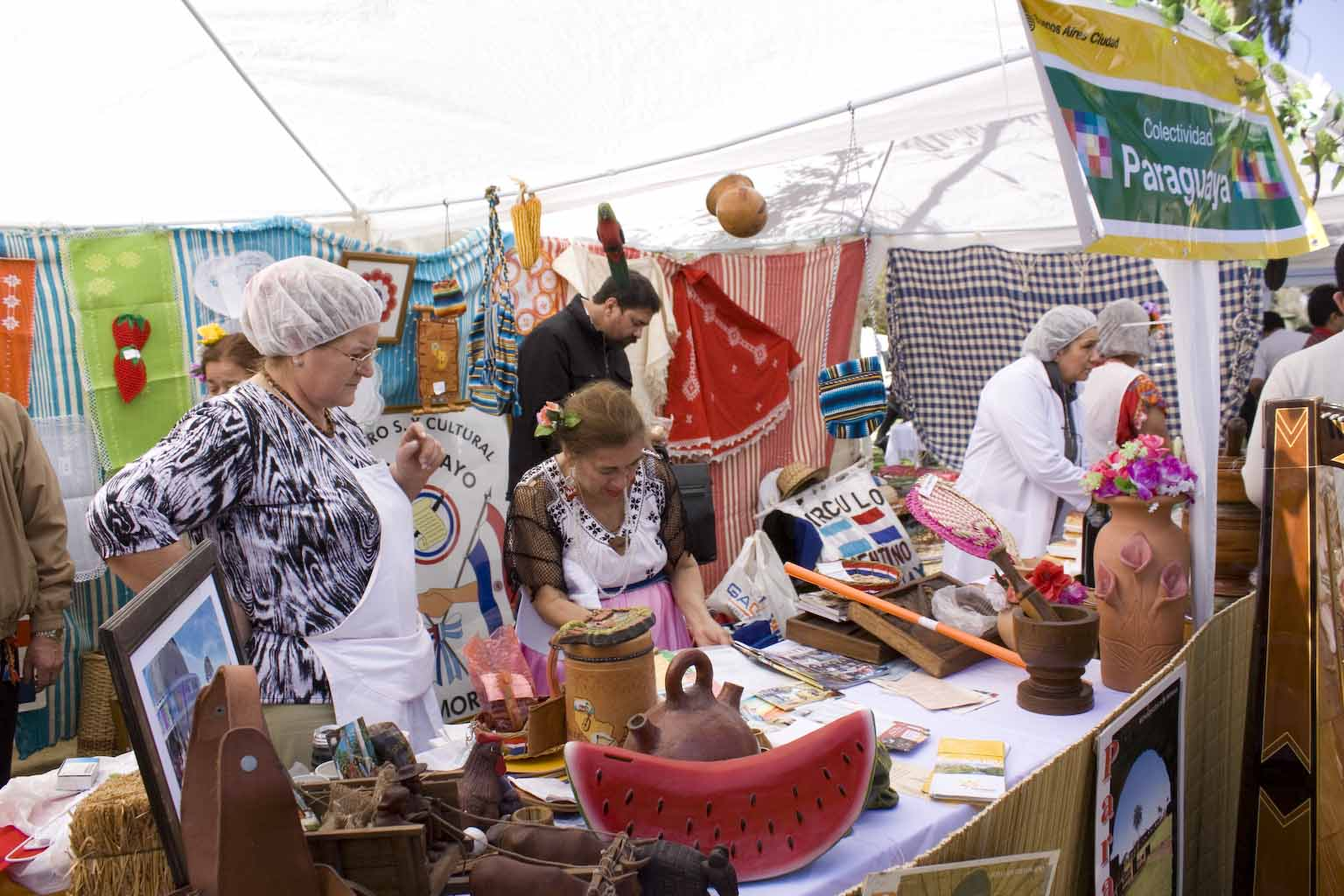 Dia del inmigrante 080